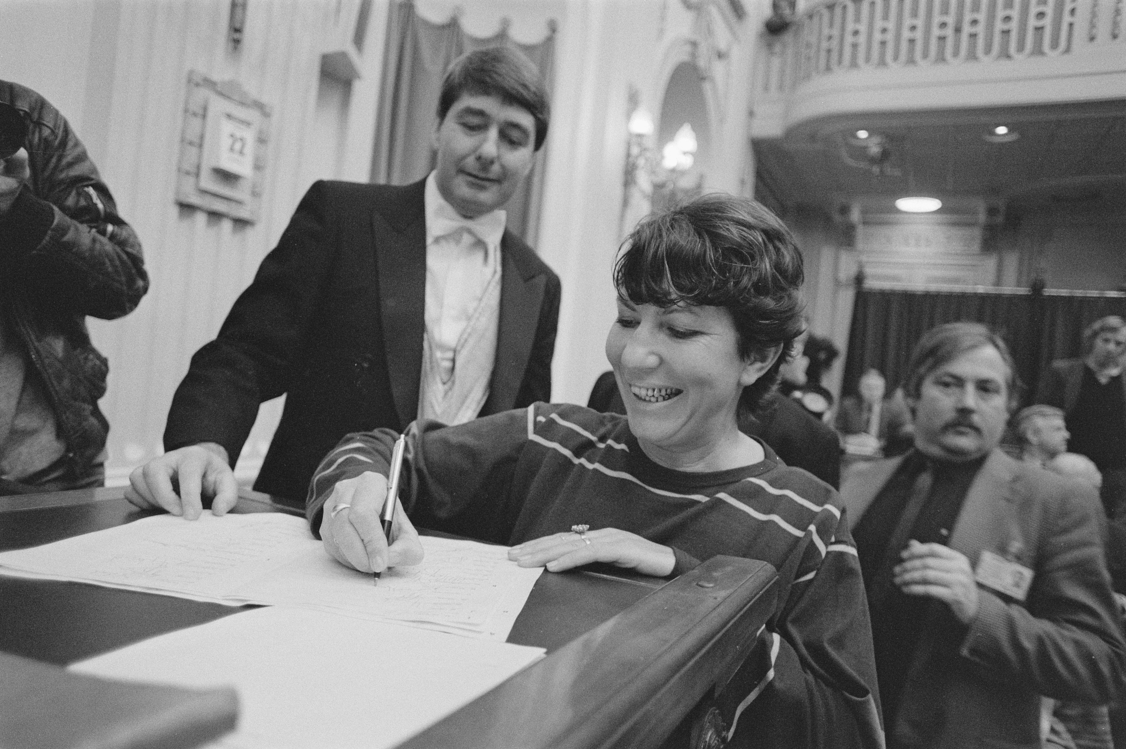 Collectie / Archief : Fotocollectie Anefo Reportage / Serie : [ onbekend ] Beschrijving : Tweede Kamer weer bijeen na kerstreces; mw H. Janmaat Abee is geïnstalleerd als opvolgster van Sytze Faber (CDA), mevr. Janmaat Datum : 22 januari 1985 Trefwoorden : politiek Persoonsnaam : H. Janmaat Abee Instellingsnaam : CDA, Tweede Kamer Fotograaf : Bogaerts, Rob / Anefo Auteursrechthebbende : Nationaal Archief Materiaalsoort : Negatief (zwart/wit) Nummer archiefinventaris : bekijk toegang 2.24.01.05 Bestanddeelnummer : 933-2103